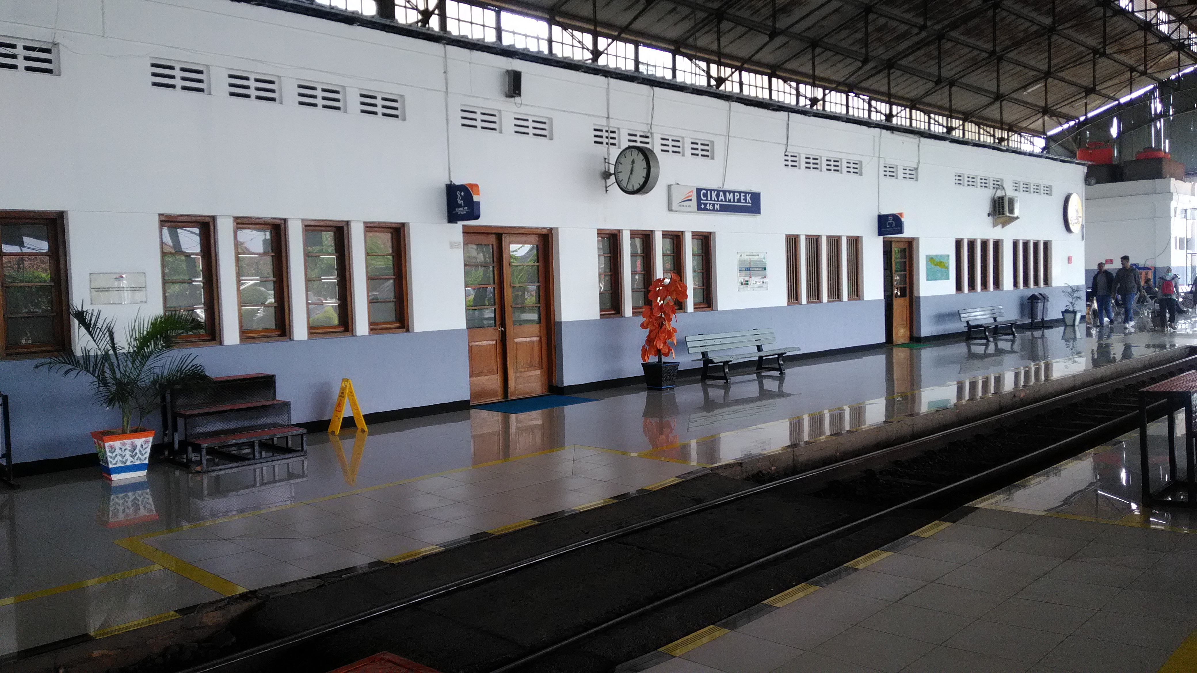 Bagian Dalam Stasiun Cikampek